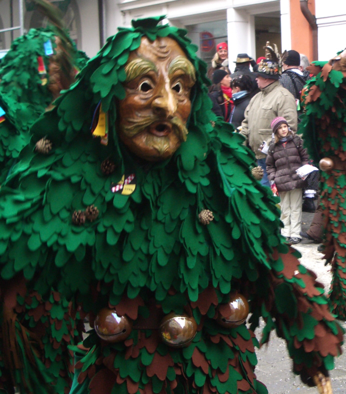 Narrensprung in Ravensburg am Fasnetsmontag 2010 Narrenzunft Raspler Baindt, Narrenfigur: „Der Waldschrat“ Weblink